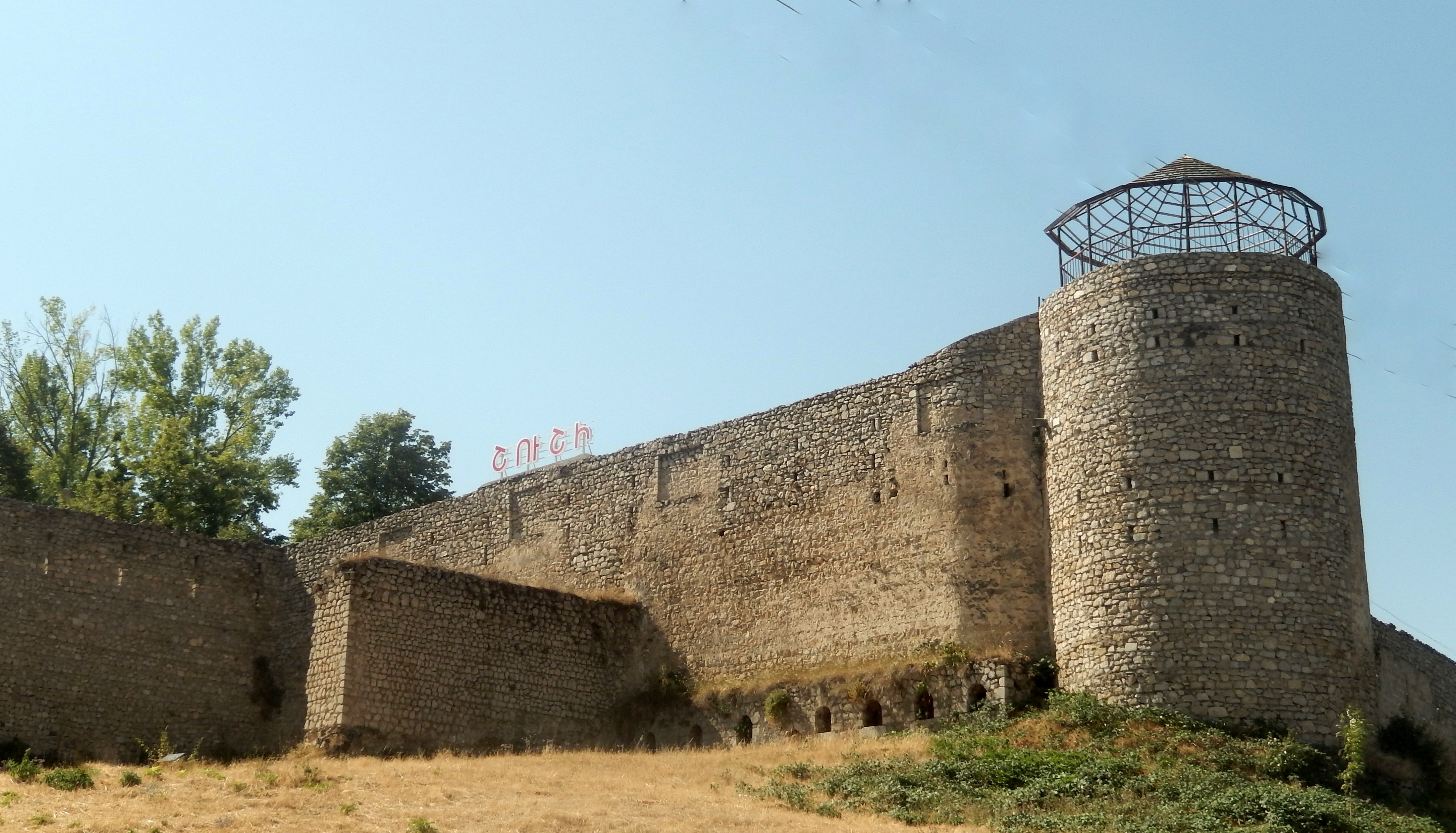 Մուտք «Ելիզավետապոլյան դարպասներ» 4.1